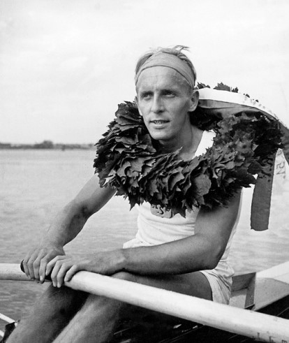 Teodor Kocerka na regatach wioślarskich w 1949